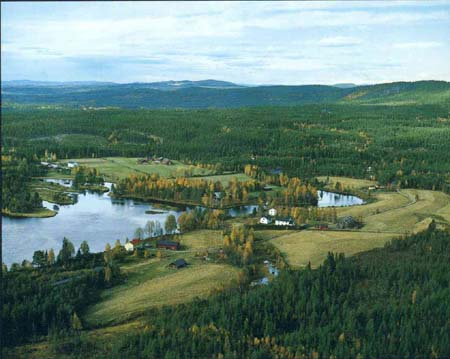 Flyfoto over Lutnes tatt fra syd mot nord.